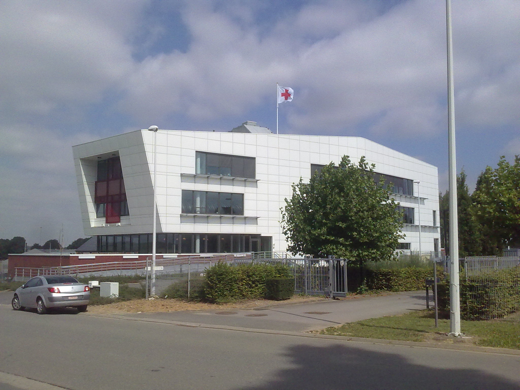 Bâtiment du Service Francophone du Sang de la Croix-Rouge de Belgique à Suarlée (Namur). inauguré en 2011. photo de 2013